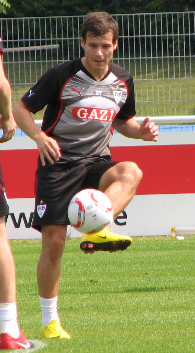 Stefano Celozzi beim Training. Aufgenommen von